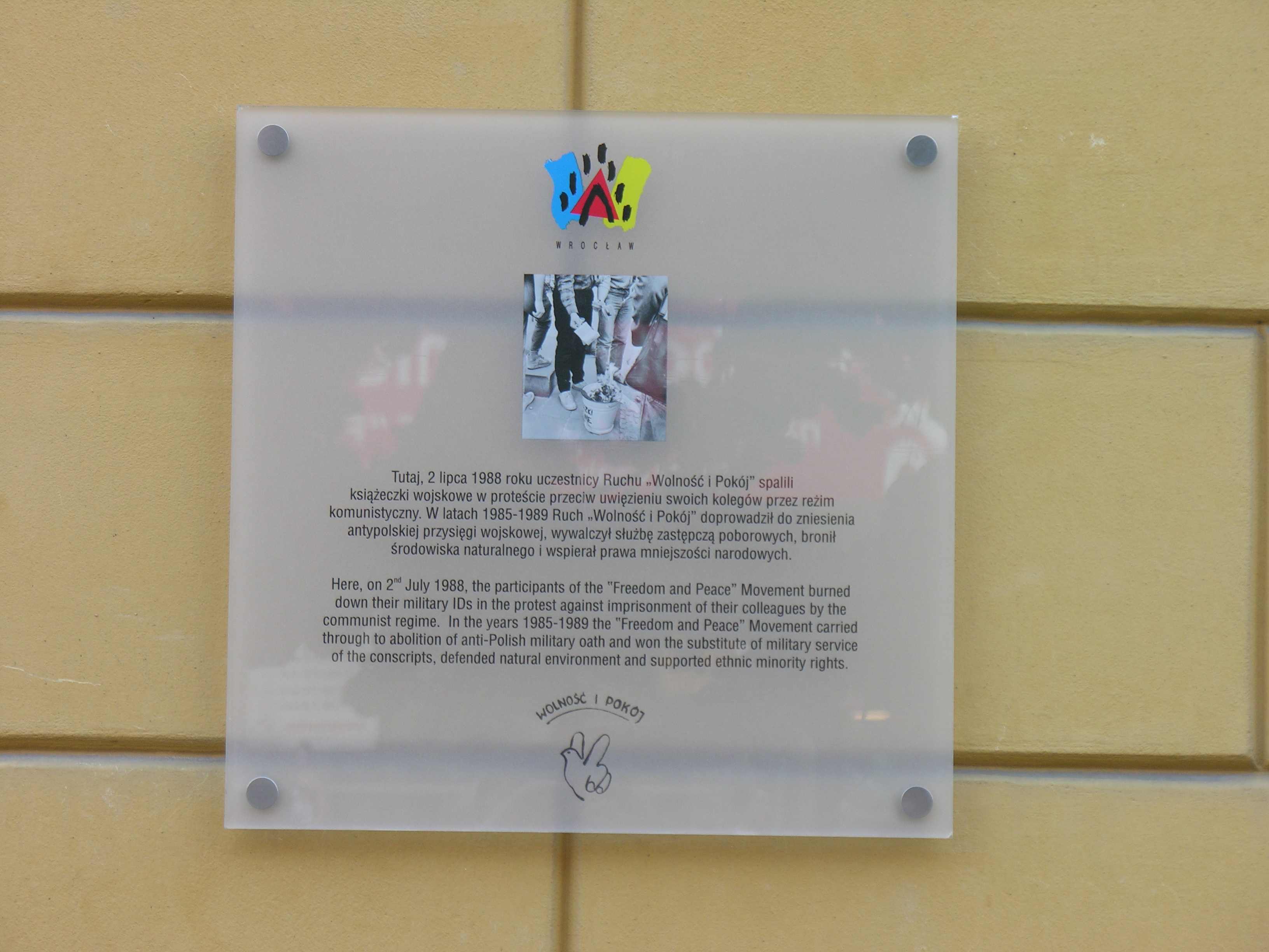 Tablica ku czci Ruchu Wolność i Pokój we Wrocławiu, Rynek-Ratusz